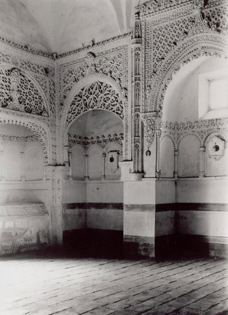 Convento de la Mejorada - Olmedo (Valladolid) - Fotografía 125 x 178 B/N